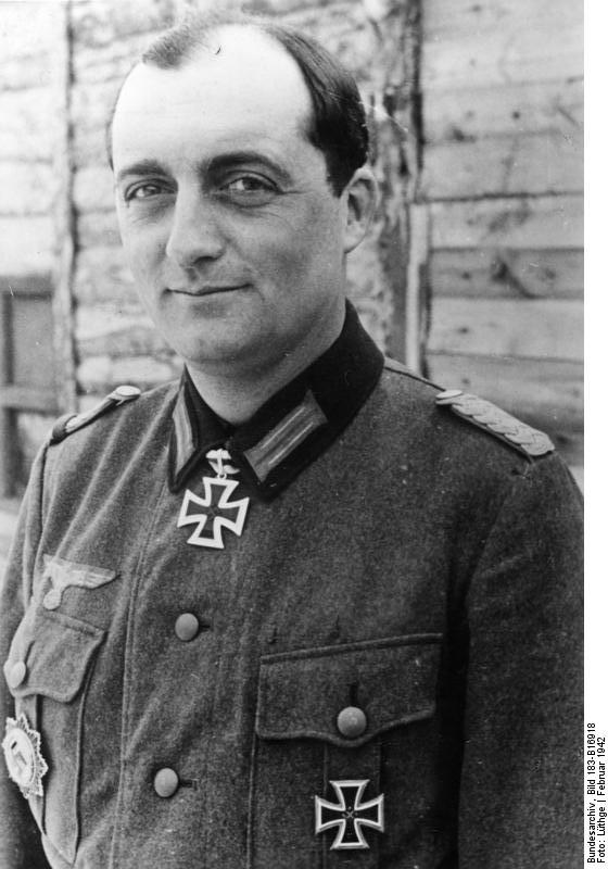 Günther Pape Major Pape [Günther]. PK-Aufnahme: Kriegsberichter Lüthge 2023-42 "Fr." "Fr." OKW Feb. 42 [(Porträt)] Abgebildete Personen: Pape, Günther: Major, Ritterkreuz (RK), Heer, Generalmajor der Bundeswehr, Bundesrepublik Deutschland